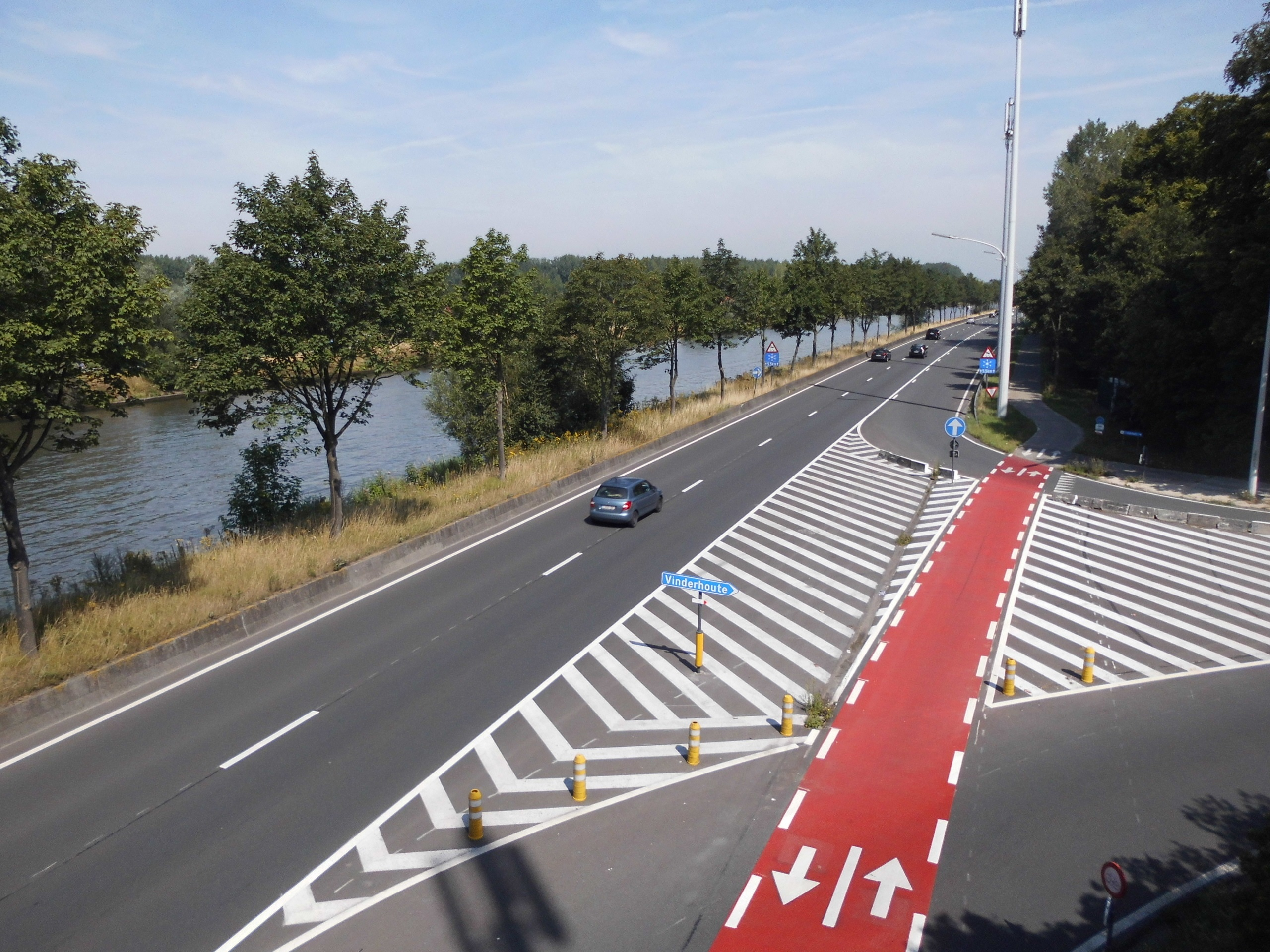 De R4 met links de Ringvaart rond Gent - afrit Vinderhoute ter hoogte van de Beekstraat - Mariakerke - Gent - Oost-Vlaanderen - België